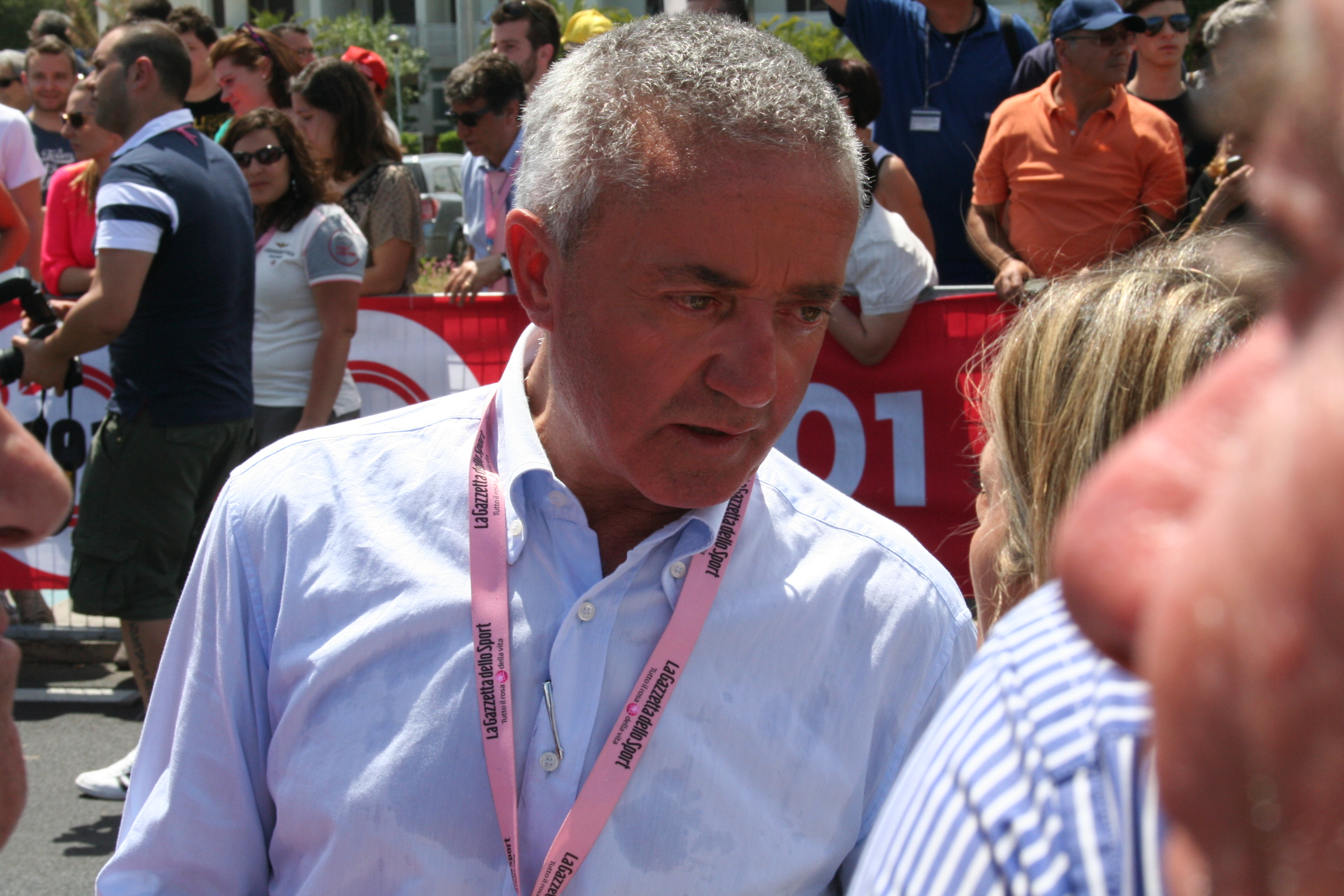 immagini dalla partenza della 7a tappa Giro 2013 (San Salvo Marina)